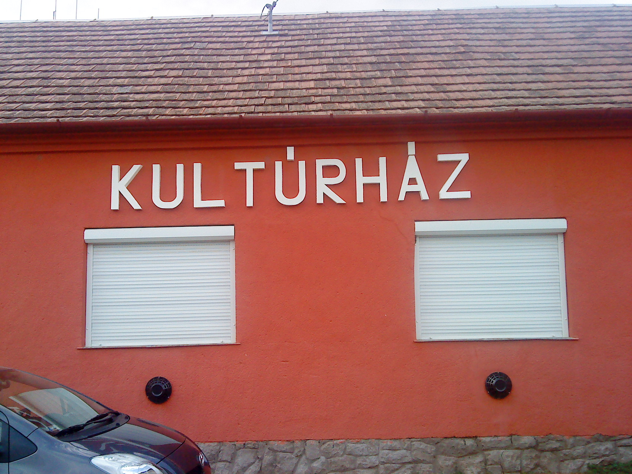 Kásádi kultúrház